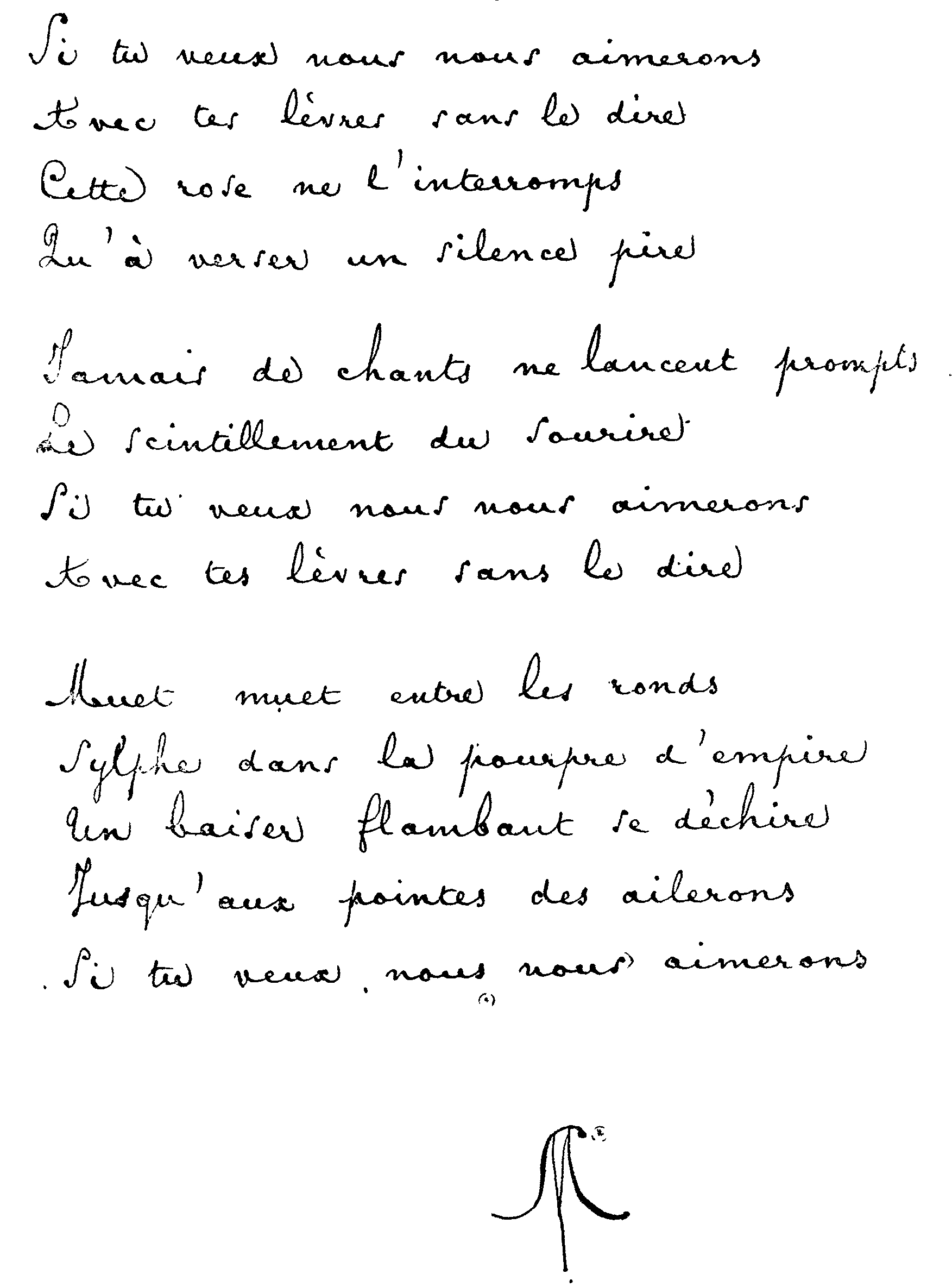 Si tu veux nous nous aimerons. Poème autographe de Stéphane Mallarmé (1842-1898)